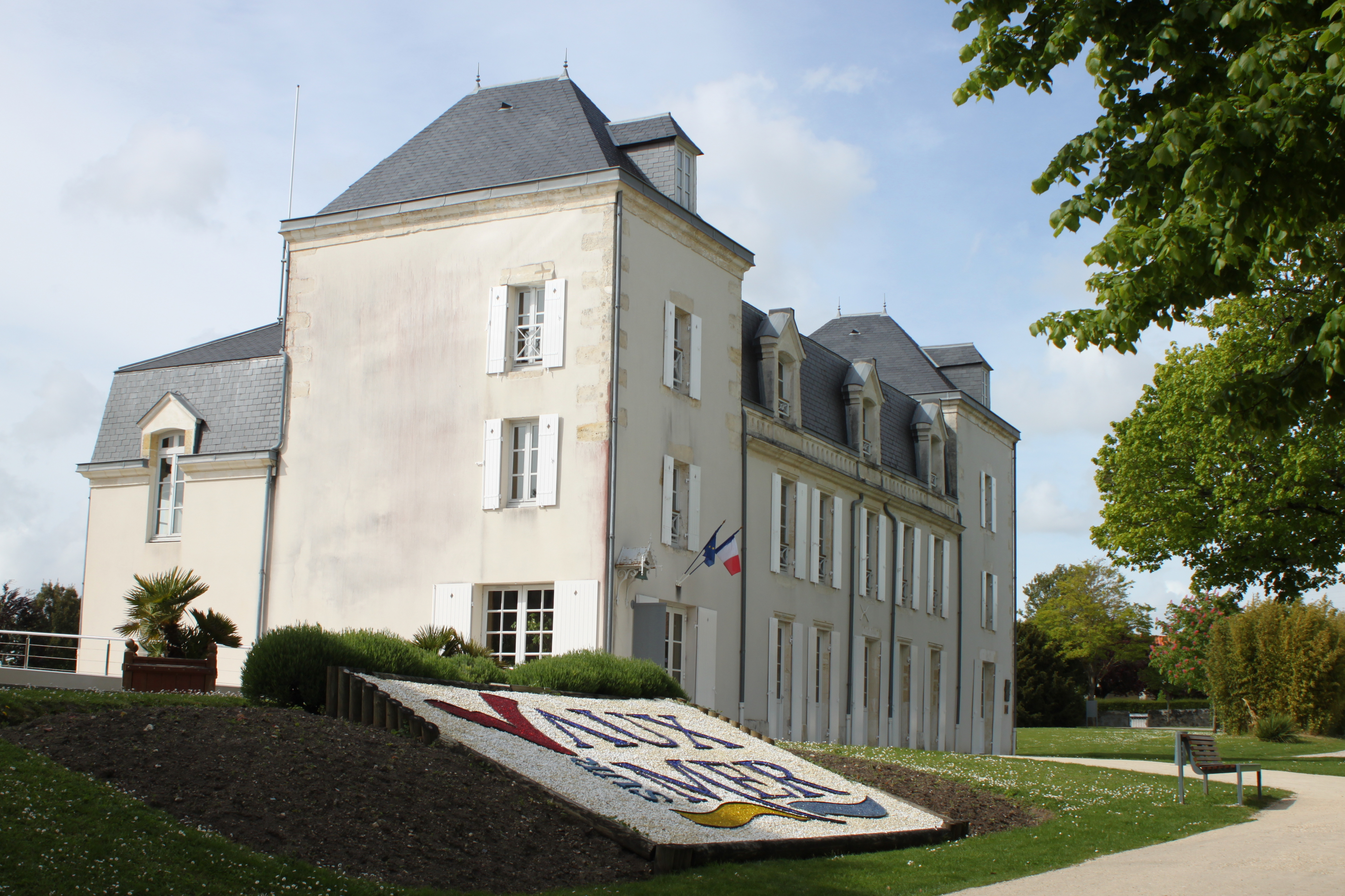 Mairie (1648), Fr-17-Vaux-sur-Mer.